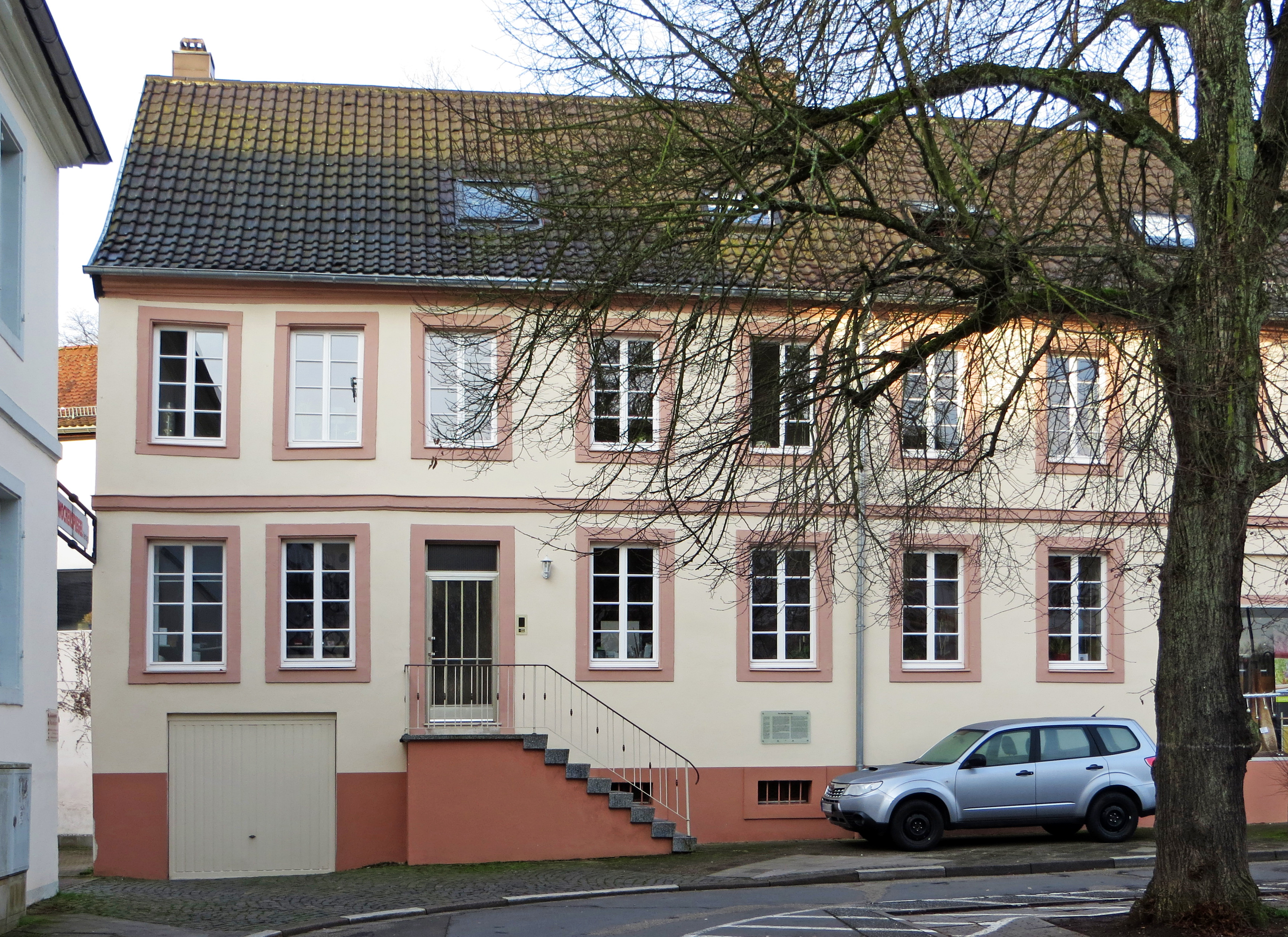 Die ehemalige Synagoge am Luitpoldplatz in Blieskastel, Saarland. Das Gebäude, erbaut um 1800, wurde 1826 von der jüdischen Gemeinde erworben. Der Synagogenraum, der bis 1908 genutzt wurde, befand sich im Obergeschoss, und war in einen größeren Raum für Männer und einen kleineren für Frauen aufgeteilt. Im Geschoss darunter befand sich eine Schule mit Lehrerwohnung.